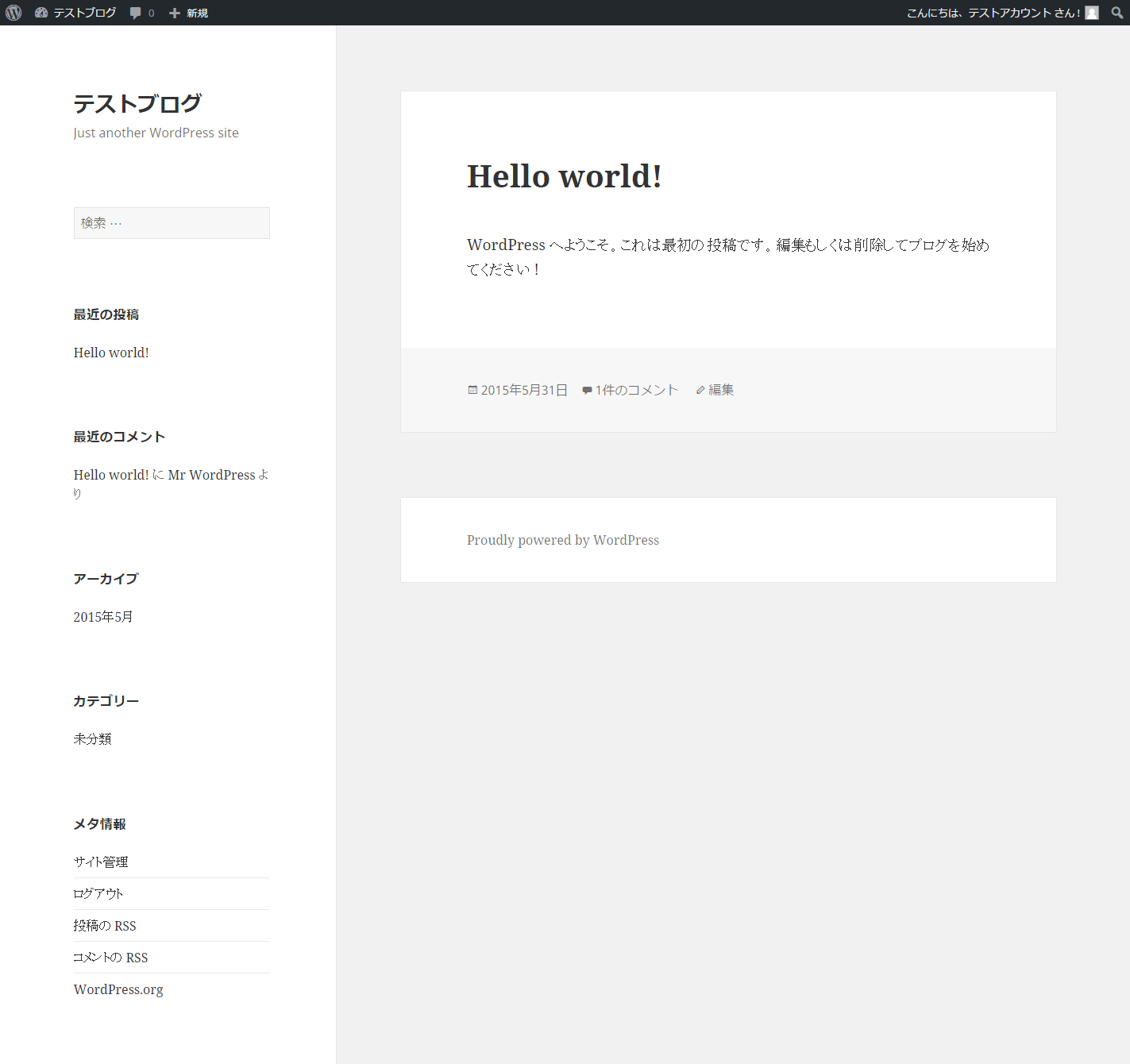 WordPressデフォルトテーマ Twenty Fifteen Theme